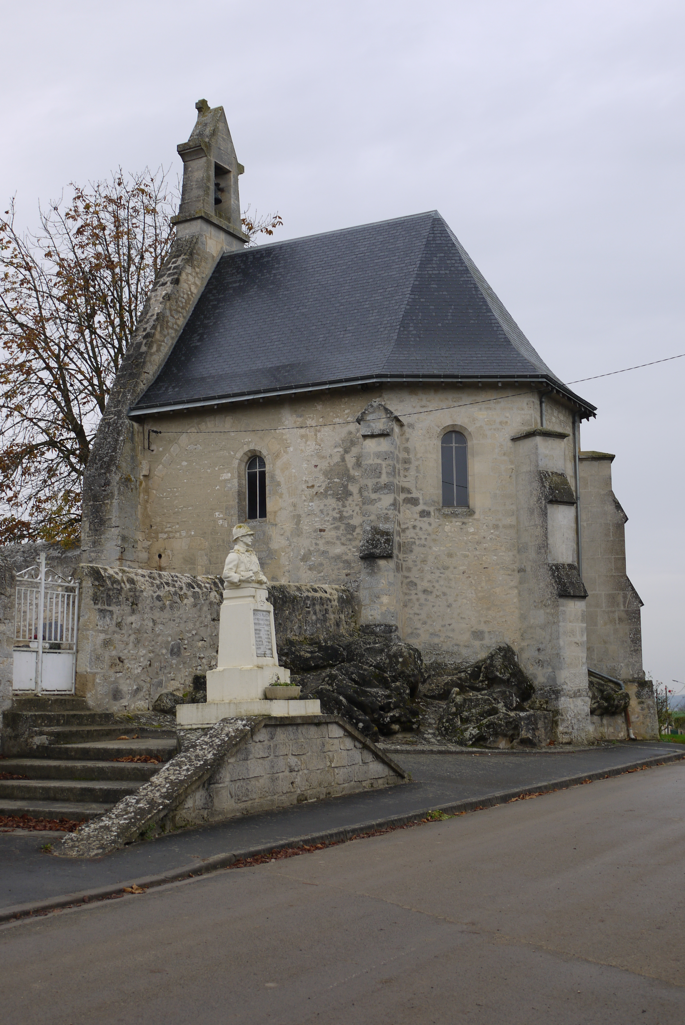 Le monument aux morts et l'église de Mont-Saint-Martin (Aisne)